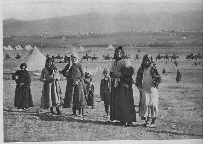 des réfugiés se massant au camp retranché franco-britannique de Zeteinlik. Les tentes d'habitation et une troupe de passage.